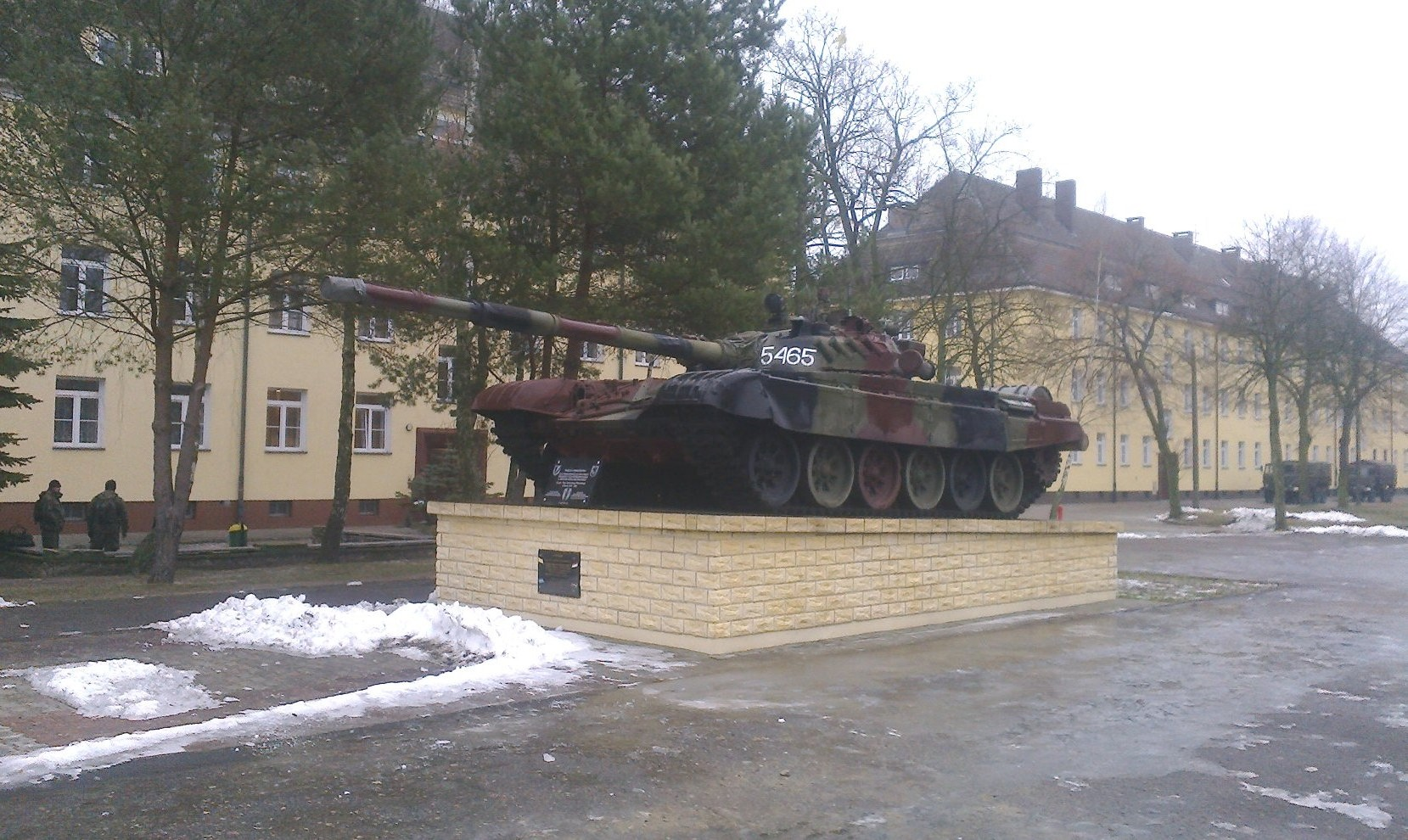 Blok 2bzmot 12BZ w Stargardzie